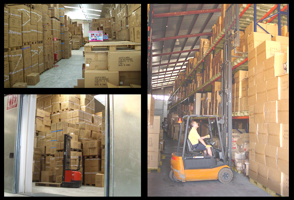 Interior centro logistico